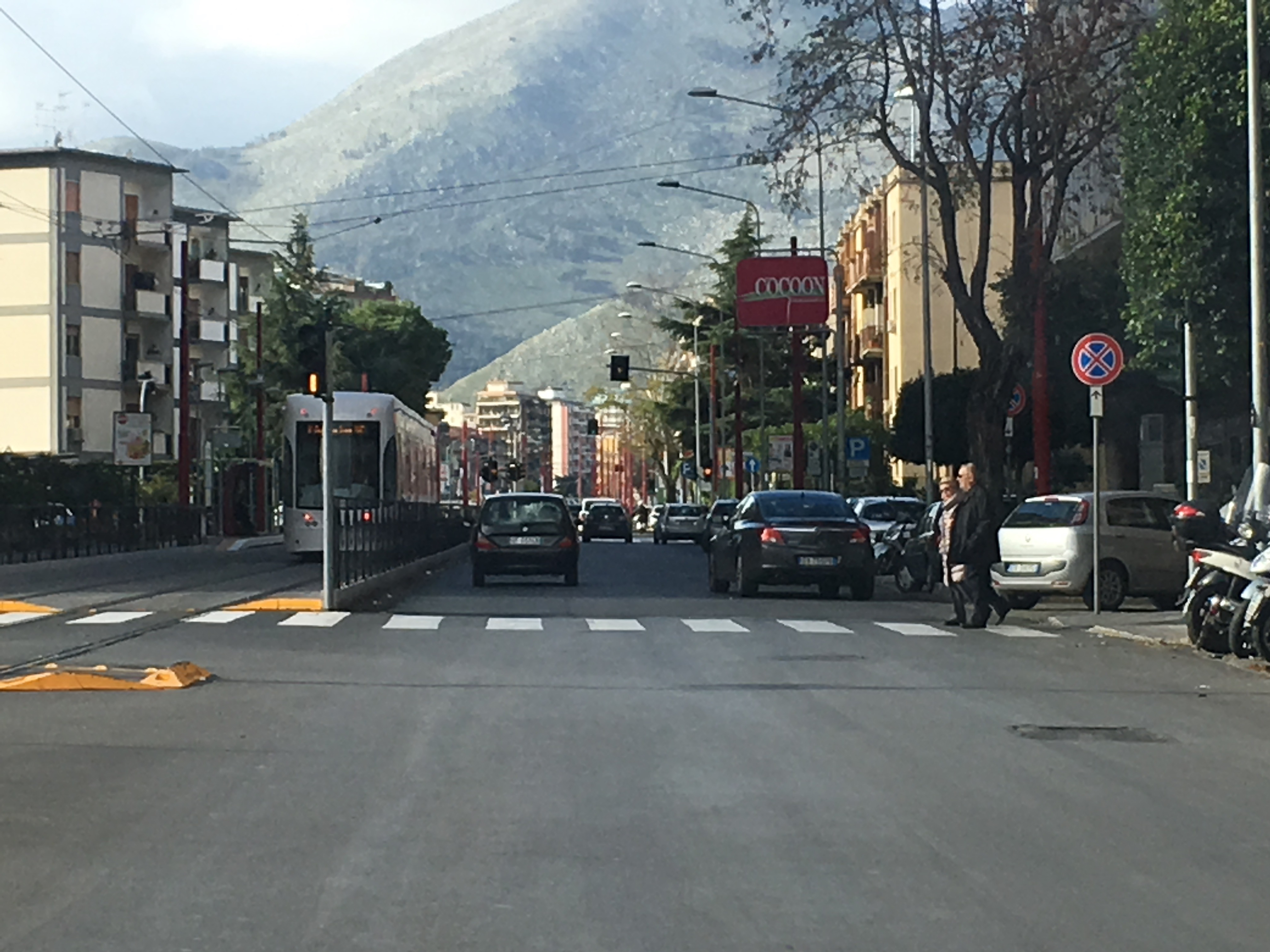 Una delle prime corse della rete tranviaria di Palermo: il tram in servizio in via Leonardo da Vinci